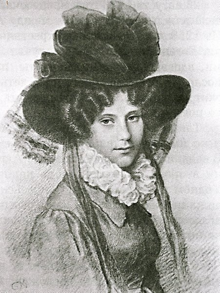 Анастасия Львовна Энгельгардт (1804 - 1860), жена поэта Е.А.Баратынского.